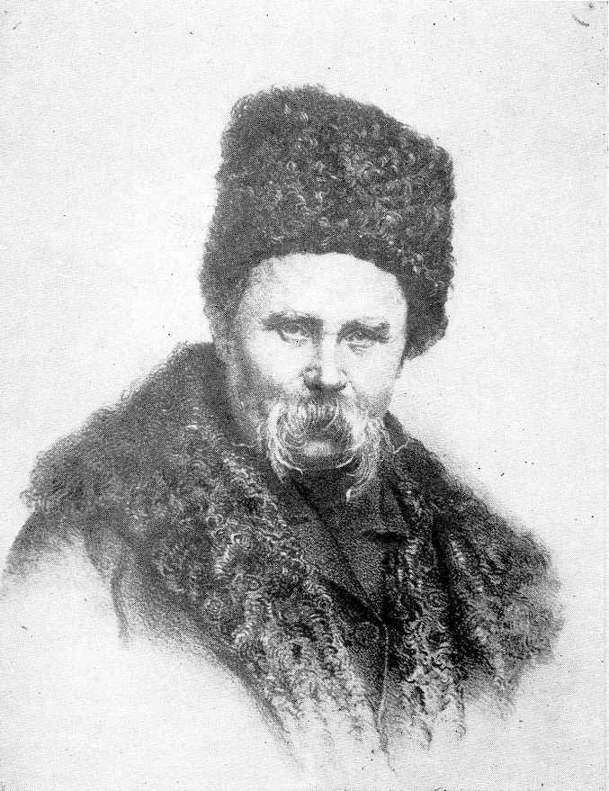 Portrait de Taras Chevtchenko par Mykola Mourachko. Lithographie de 1864-1867 d'après une photographie de 1859.